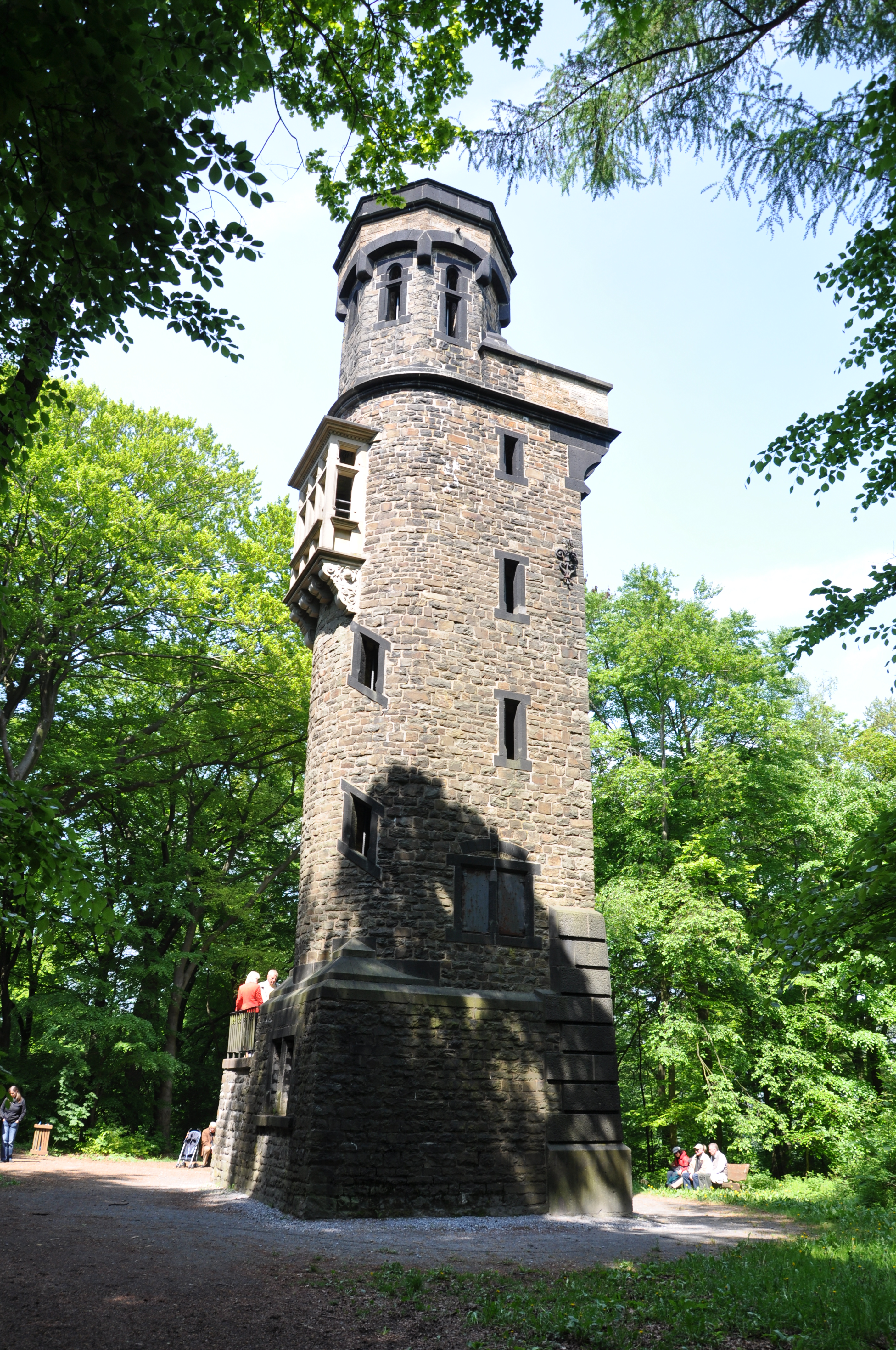 Königshöher Weg, Wuppertal